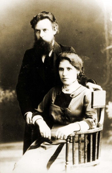 Павел Петрович и Валентина Александровна Бажовы. 1911 г.